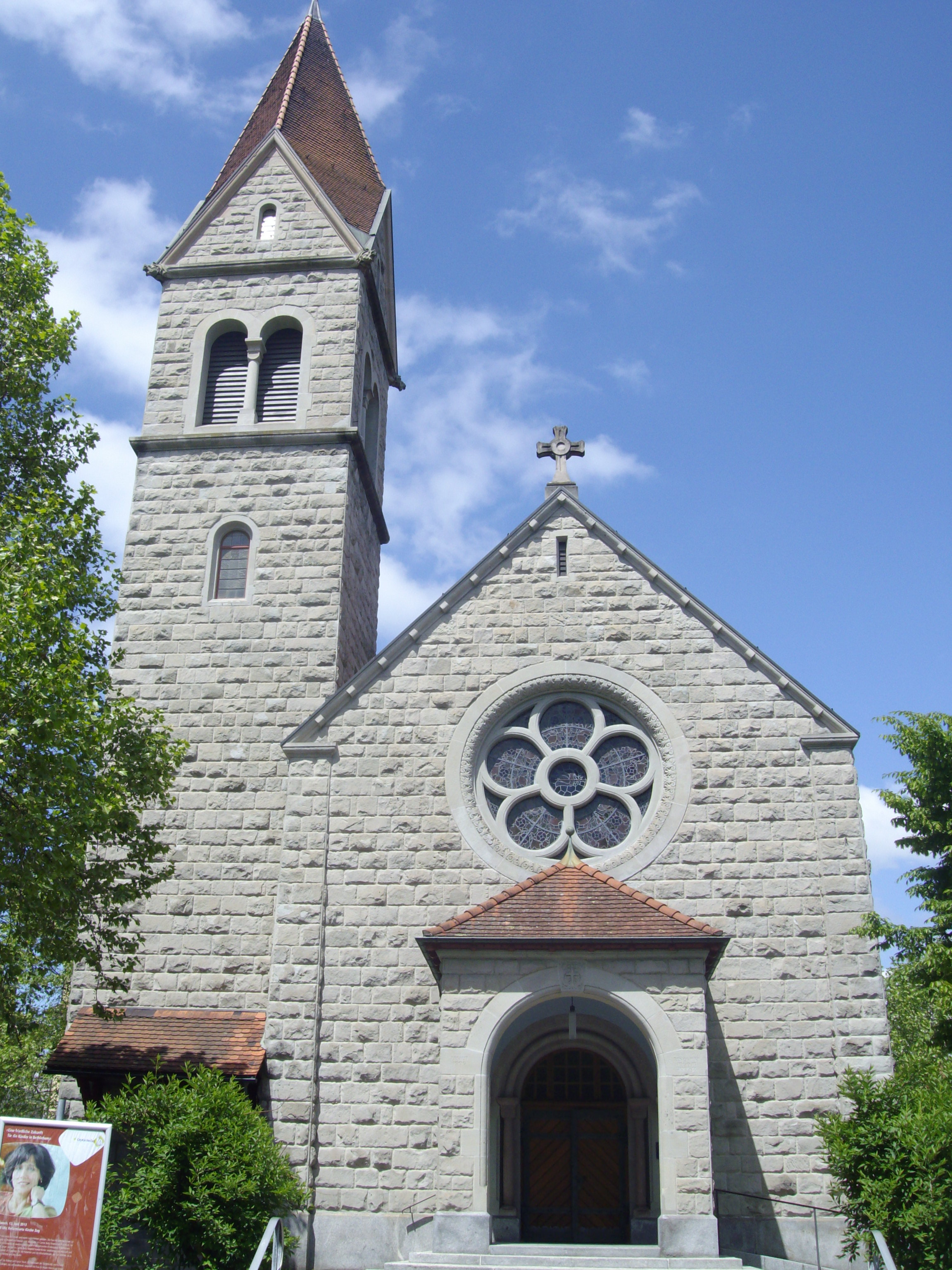 Reformierte Kirche Zug, Schweiz